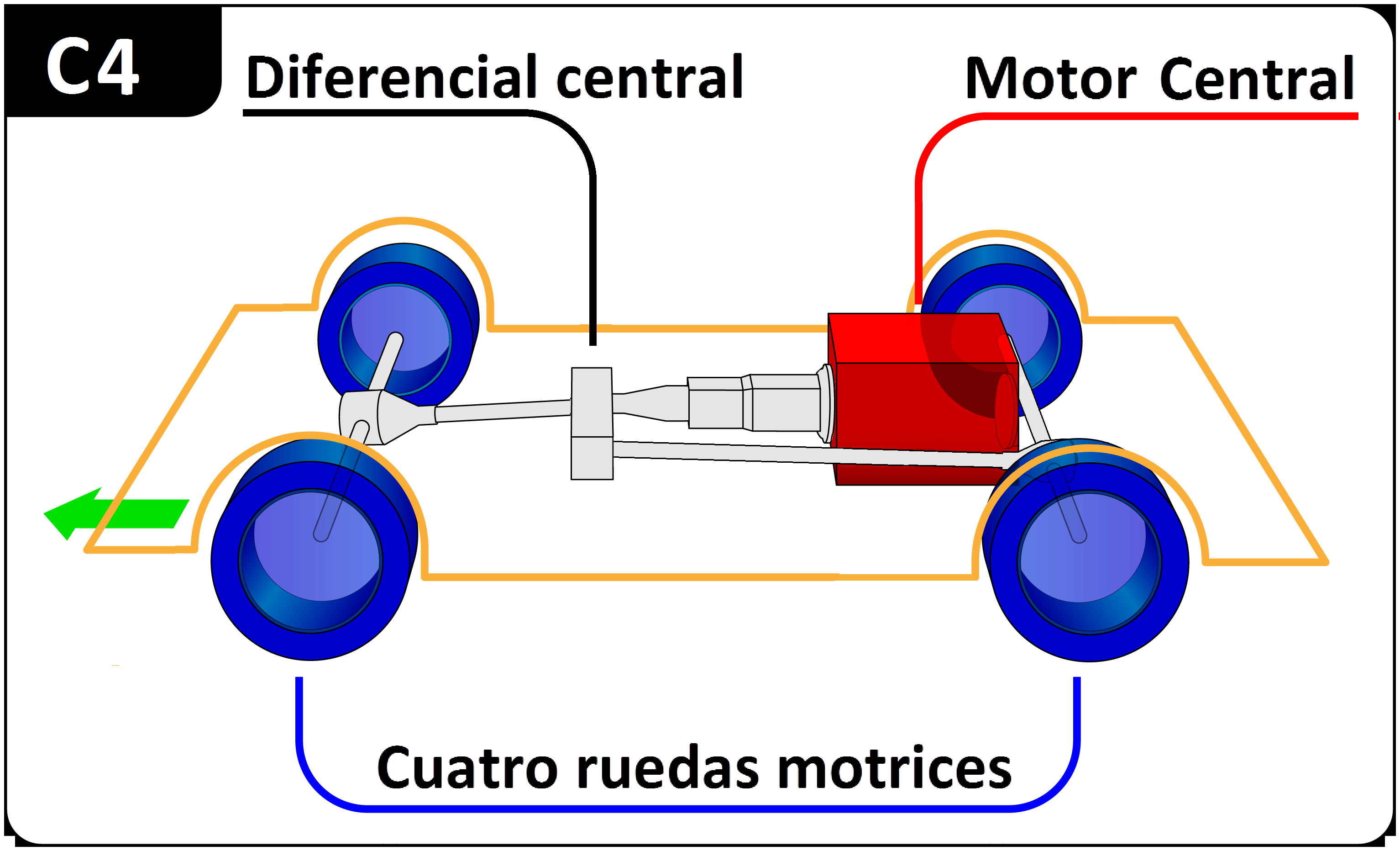 Diagrama de un vehículo con motor central y tracción en las cuatro ruedas (C4)